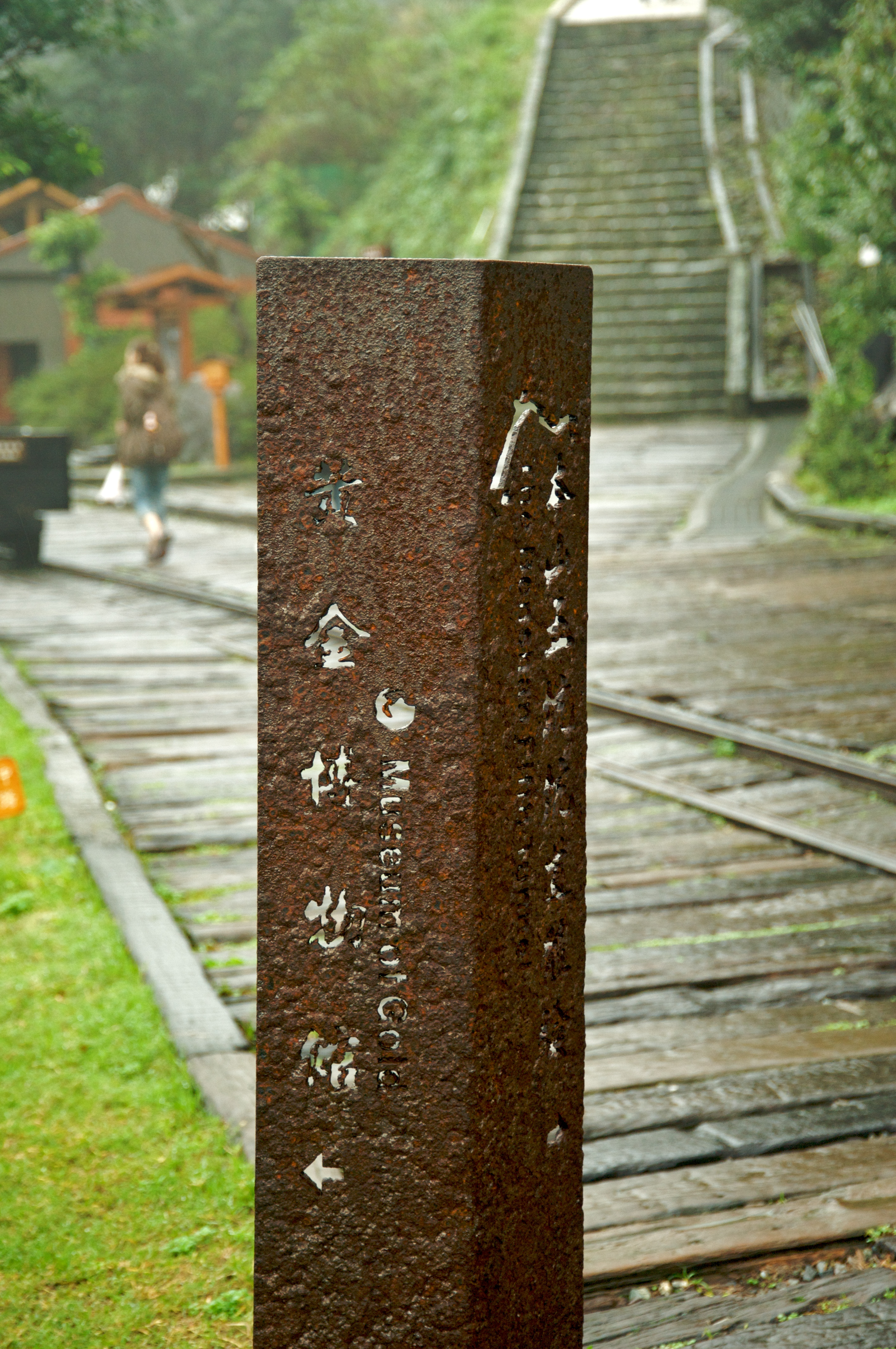 新北市立黃金博物館路標